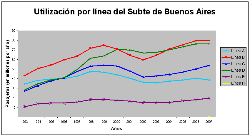 Årlig passasjerantall per linje.